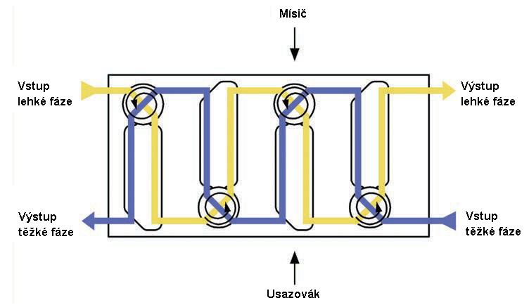 Schéma protiproudné baterie mísičů - usazováků